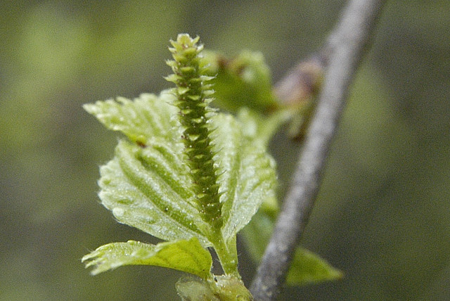 Betula pubescens from Commanster, Belgian High Ardennes .